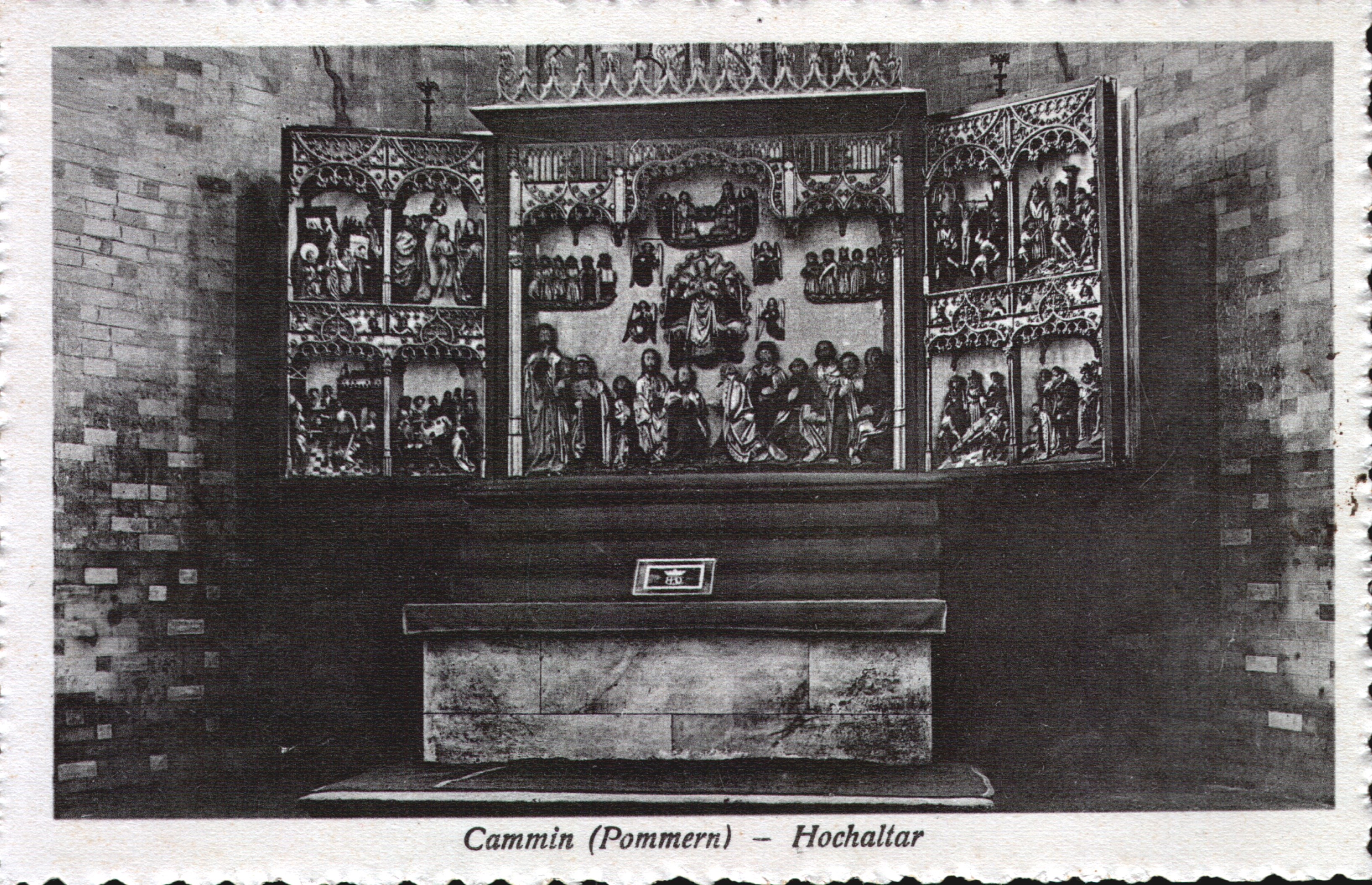 Ołtarz główny w Katedrze św. Jana Chrzciciela w Kamieniu Pomorskim. Widok sprzed II wojny światowej.